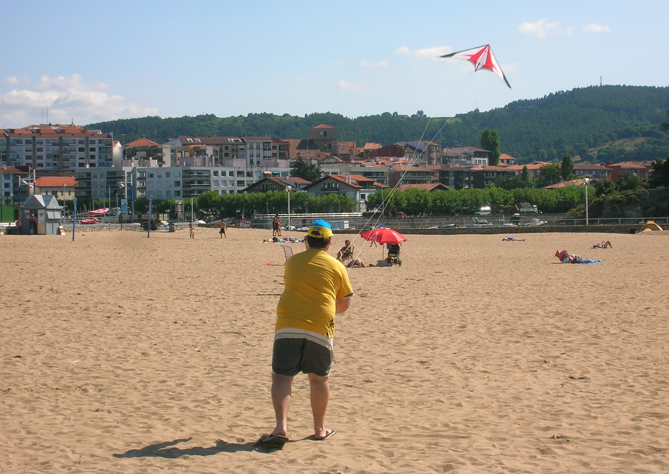 Playa de Plencia